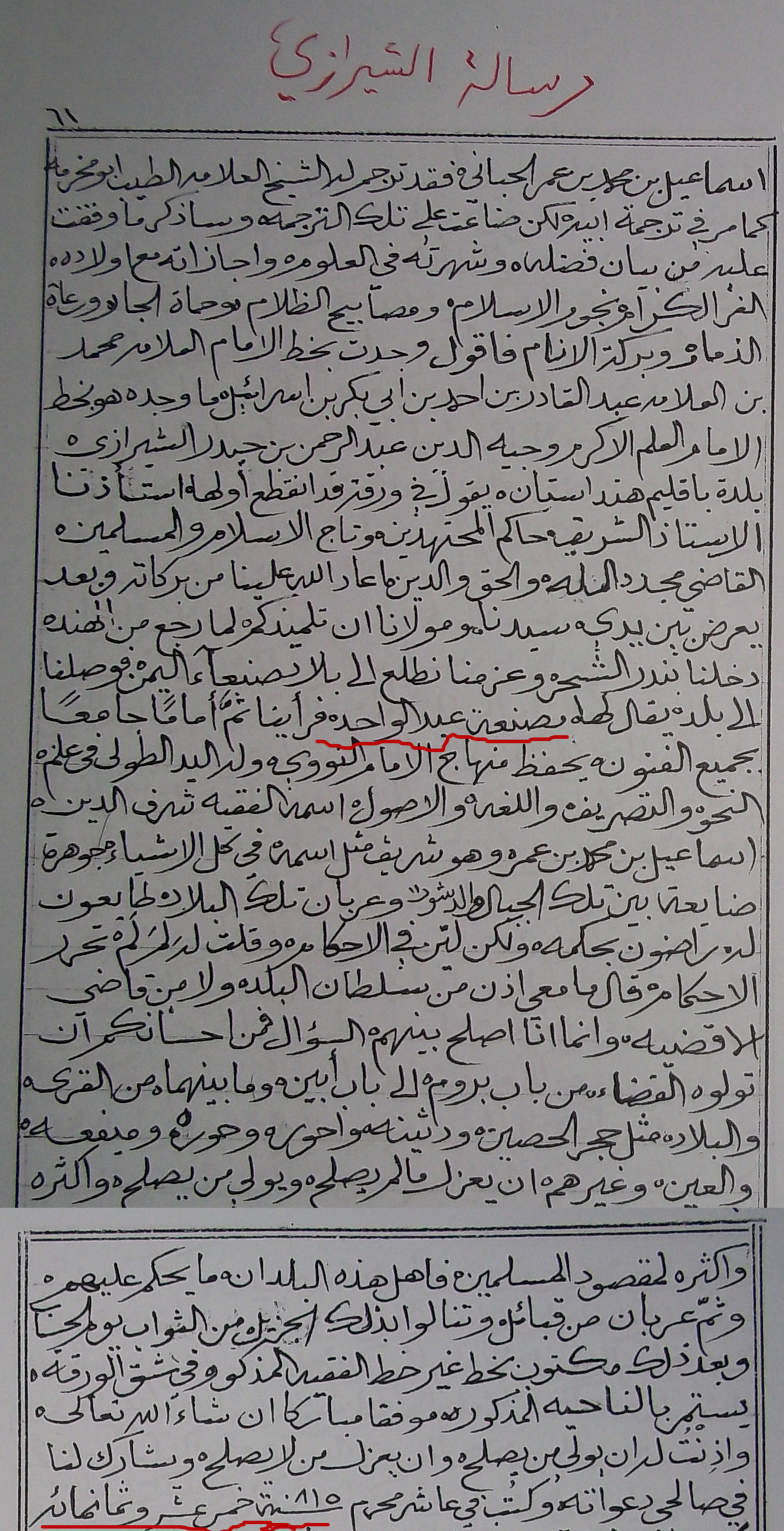 نص رسالة العلامة عبدالرحمن بن حيدر الشيرازي الدهقلي عند زيارته لحبان سنة 813 للهجرة ، الصورة من مخطوط الكوكب المنير الأزهر لسالم بن أحمد المحضار